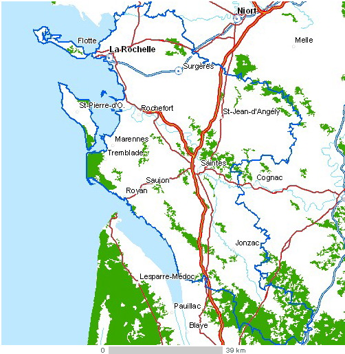 Carte du département Charente-Maritime Légende